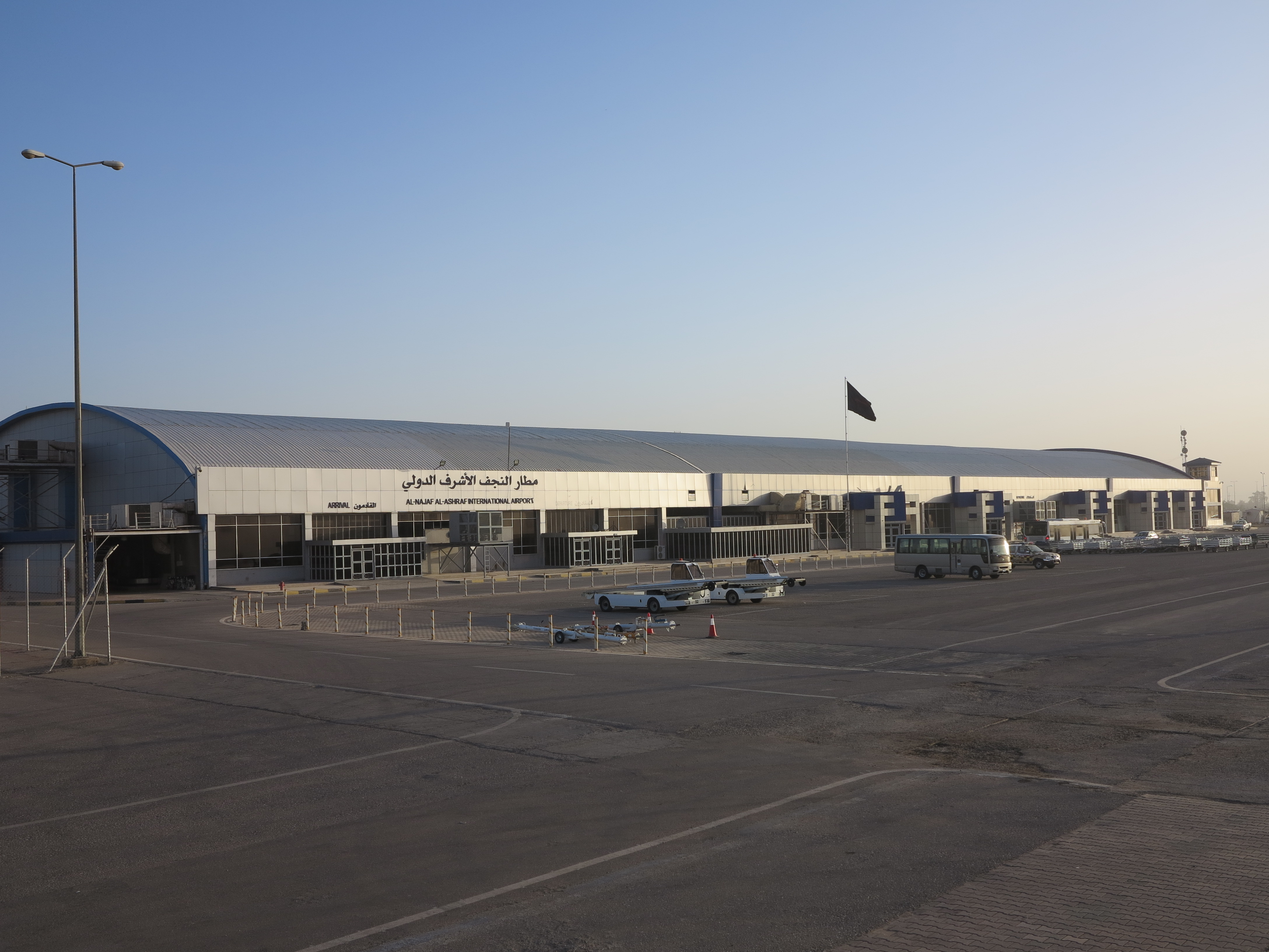 AL NAJAF AL ASHRAF INT.AIRPORT